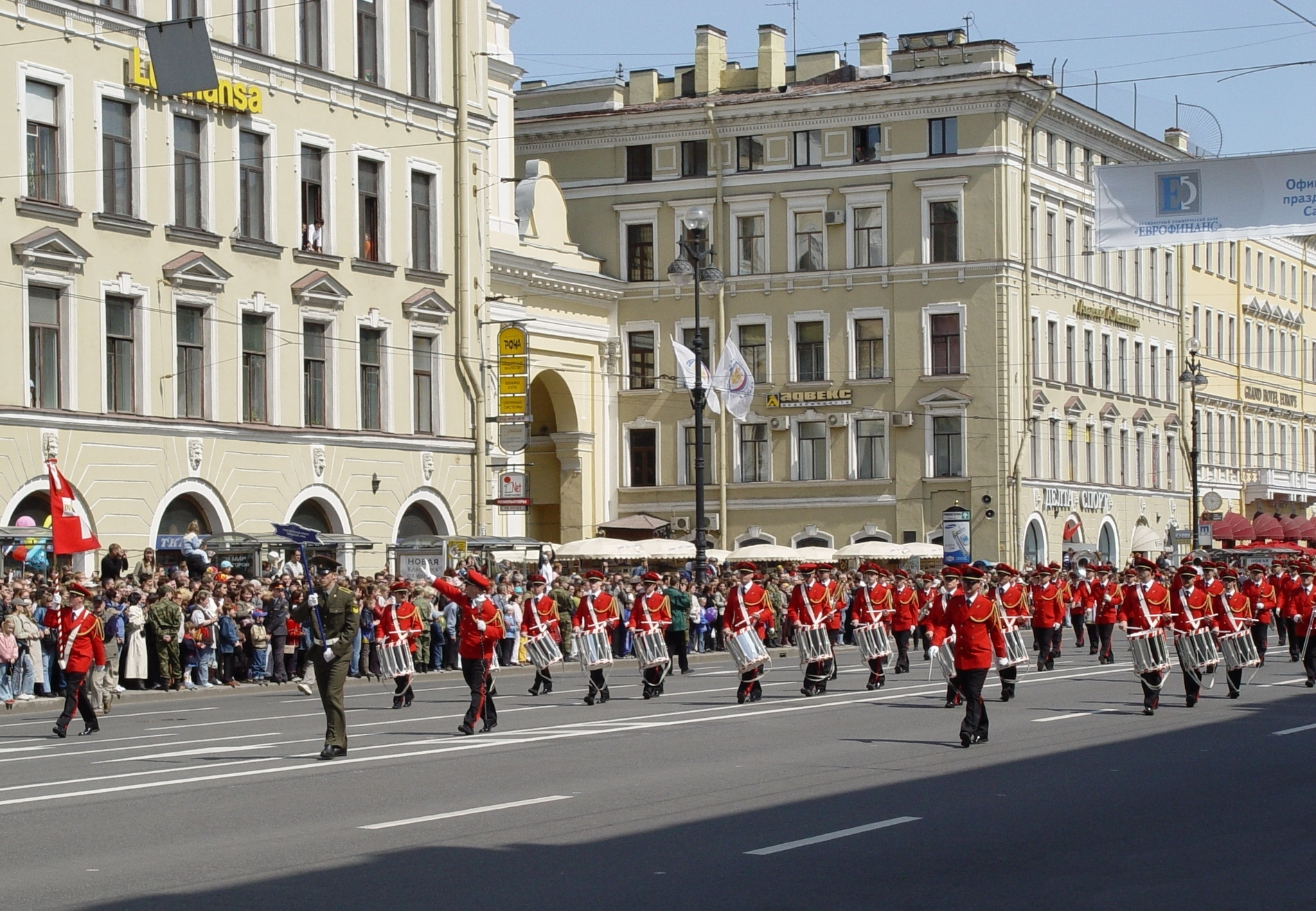 300-летие Санкт-Петербурга. Праздничный парад на Невском.